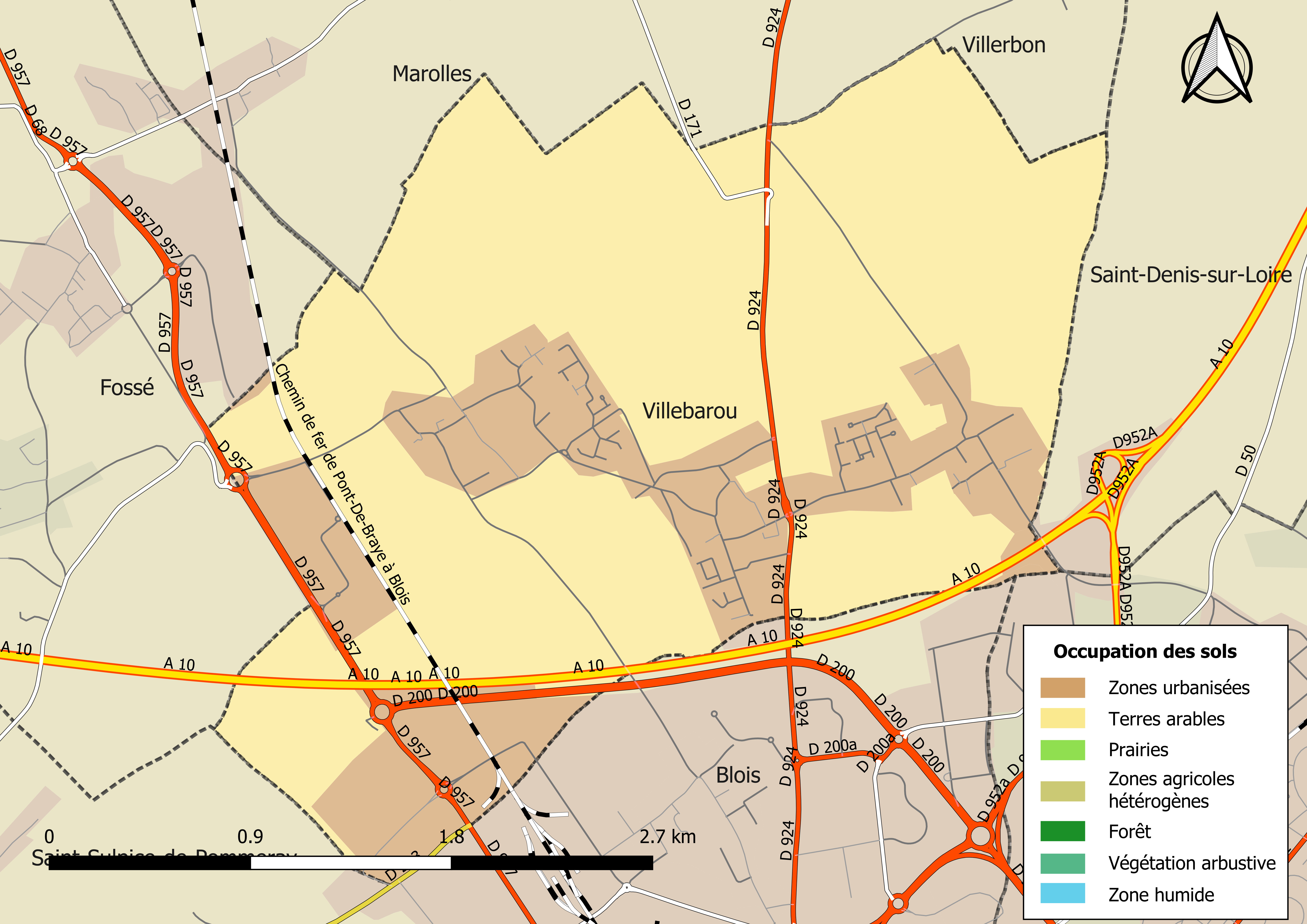 Carte des infrastructures et de l’occupation des sols en 2018 de la commune de Villebarou (Loir-et-Cher) (France).